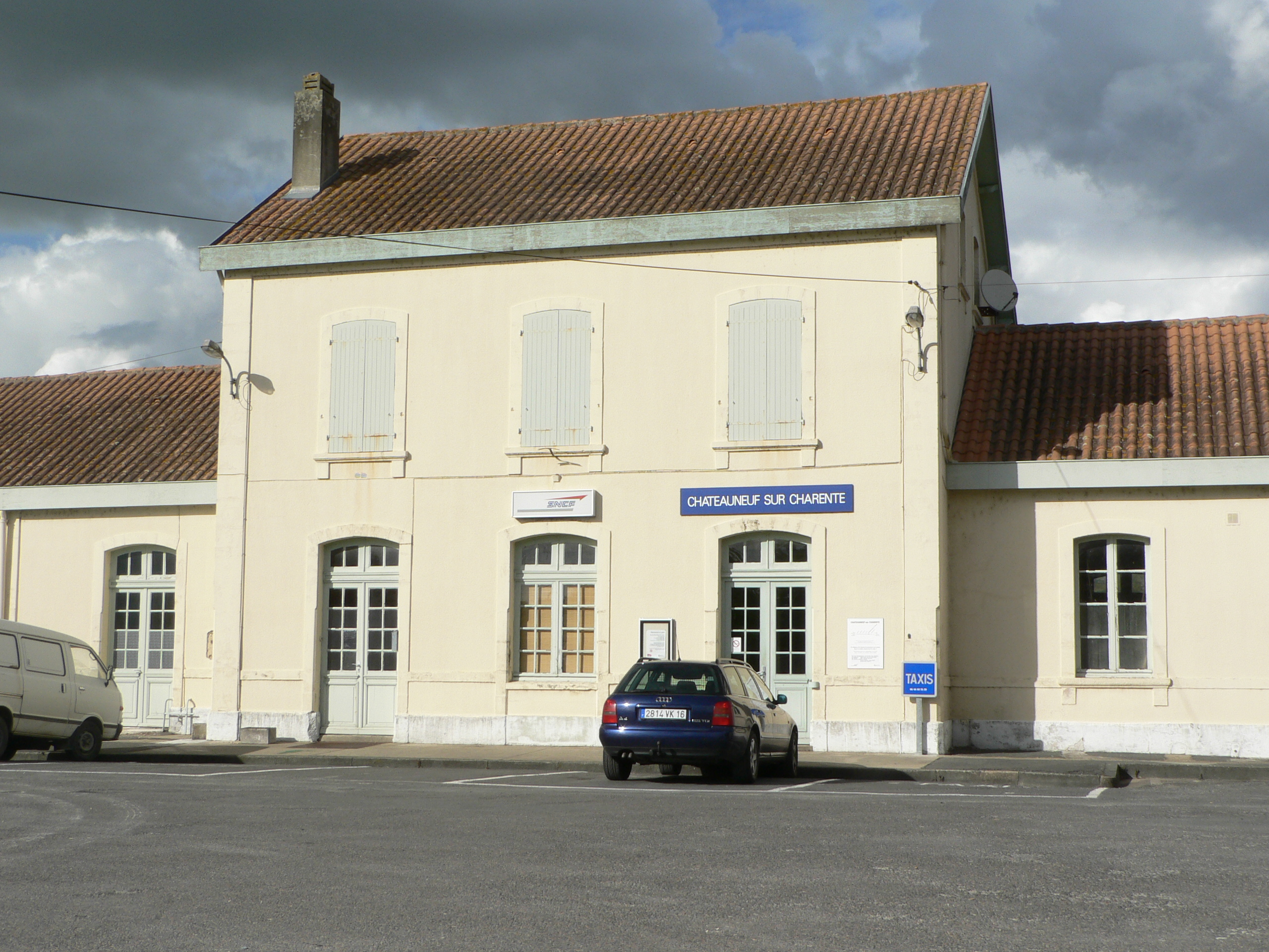 Gare de Châteauneuf-sur-Charente vue de la place de la gare